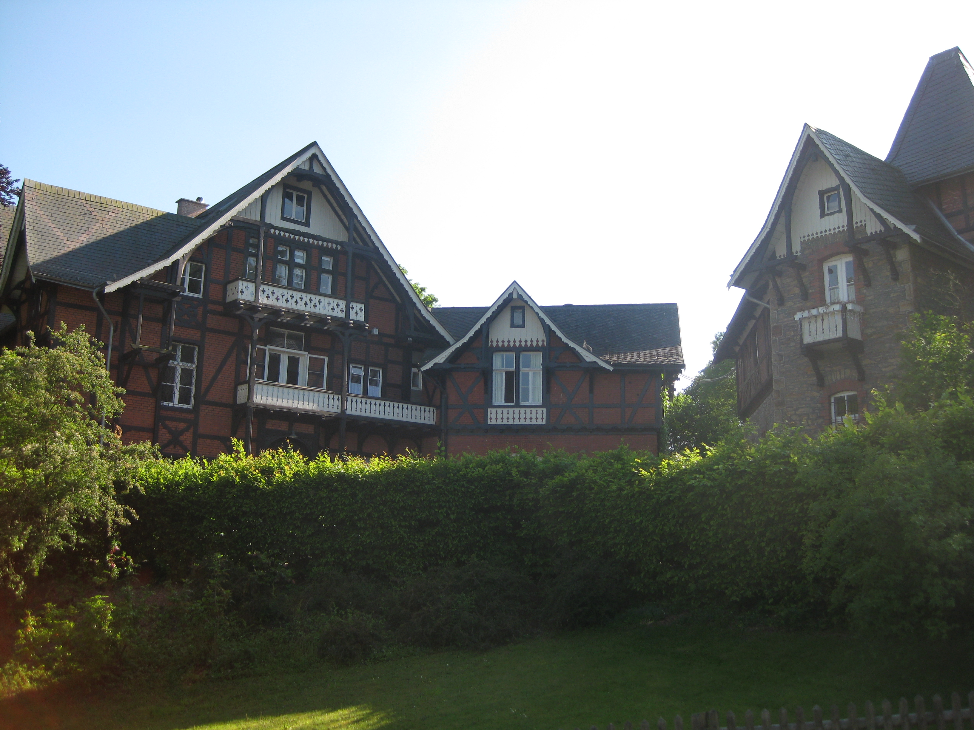 Ansicht von der Lucasstraße